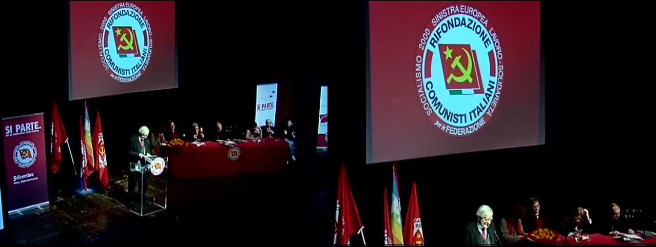 Screenshot filmato youtube scaricabile liberamente, lavorato con